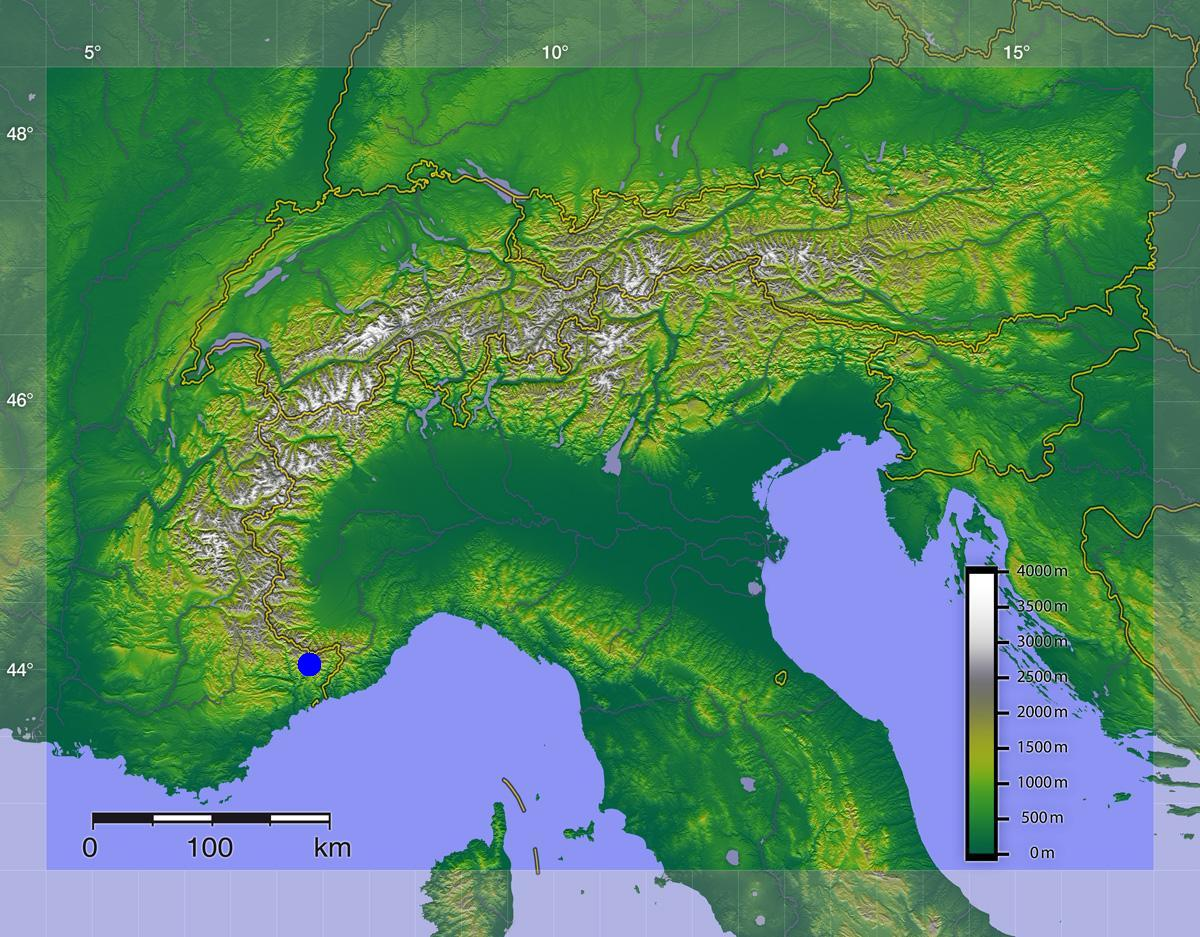 Приморские Альпы на карте Альп